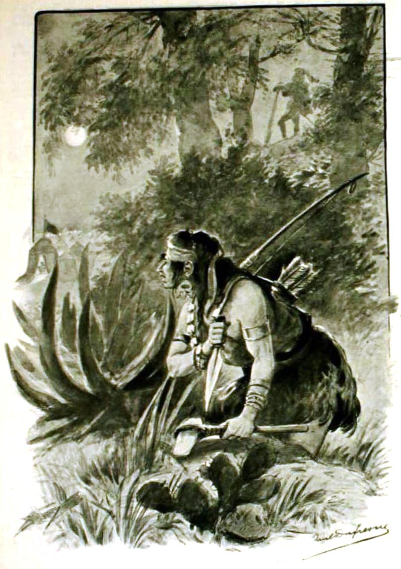 "Lientur" por Paul Dufresne. "Ocultándose entre los arbustos, en medio de las sombras de la noche, se arrastraba hacia la tienda del español con el firme propósito de matarlo."